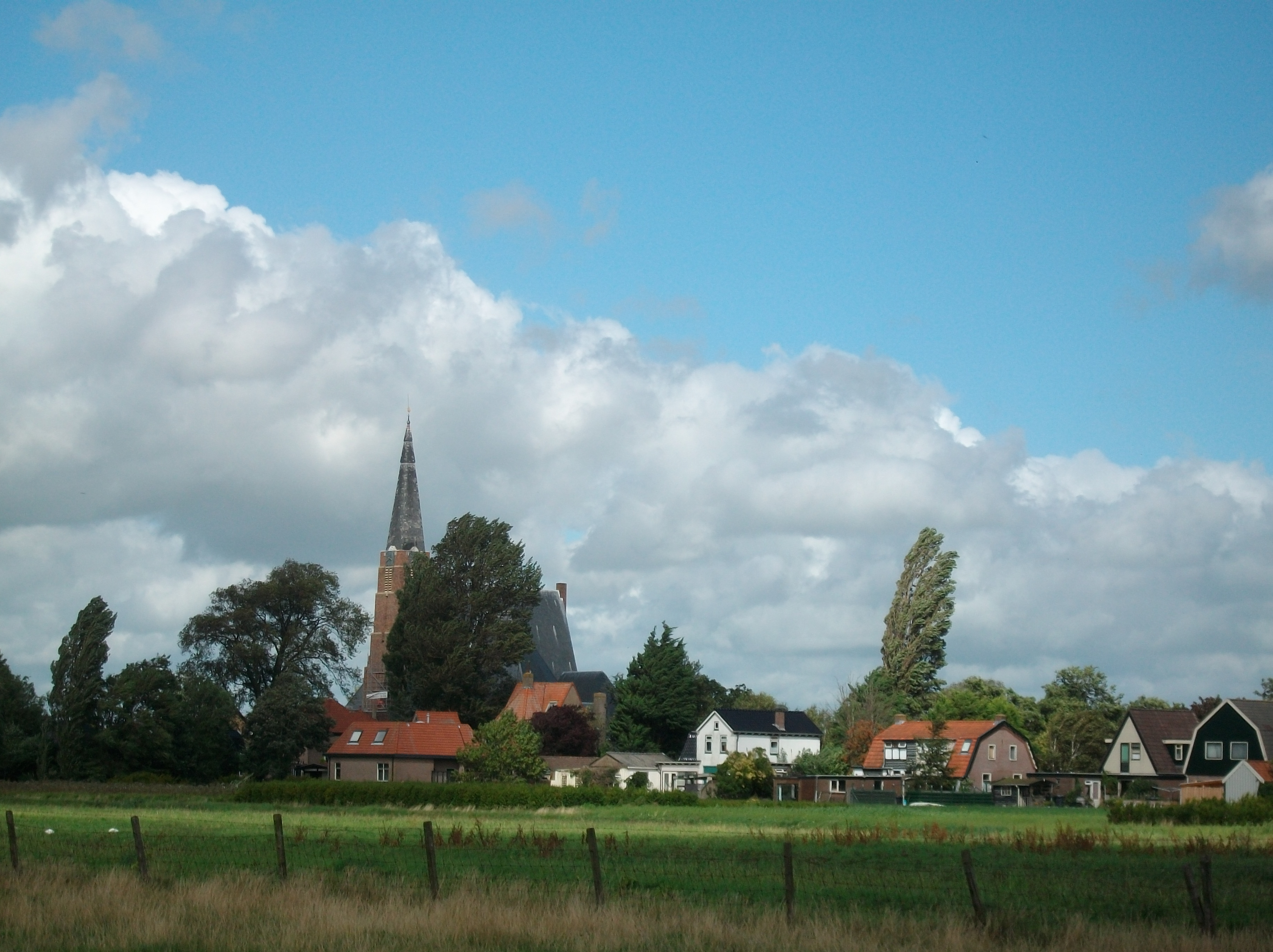 Andijk (NL)